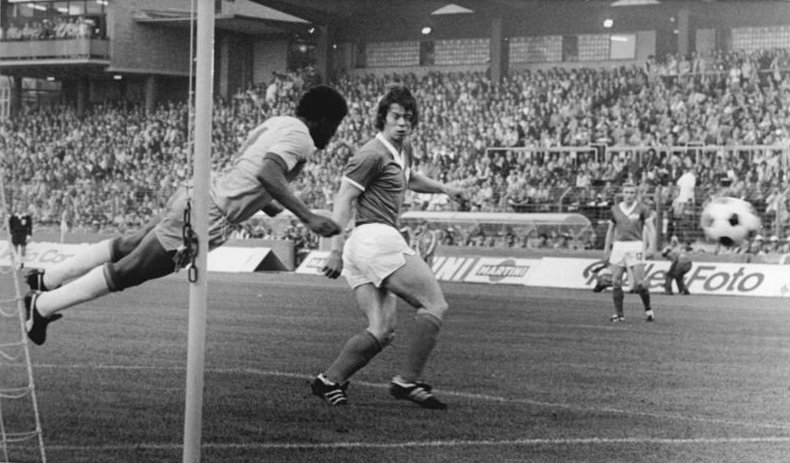 ADN-ZB Mittelstädt 26.6.74 BRD-Hannover: X. Fußball-Weltmeisterschaft - 2. Finalrunde, Gruppe A: Brasilien - DDR 1:0 Verteidiger Luiz Pereira (Brasilien-links) köpft den Ball zur Ecke. Bildmitte Jürgen Sparwasser. Im Hintergrund rechts Siegmar Wätzlich (beide DDR).